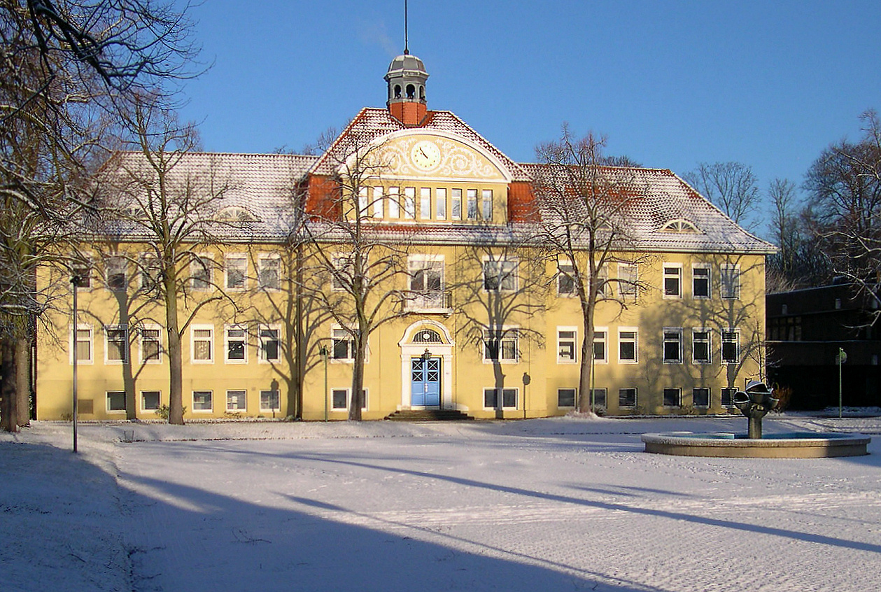 Schulgebäude des Landesbildungszentrums für Blinde in Hannover-Kirchrode